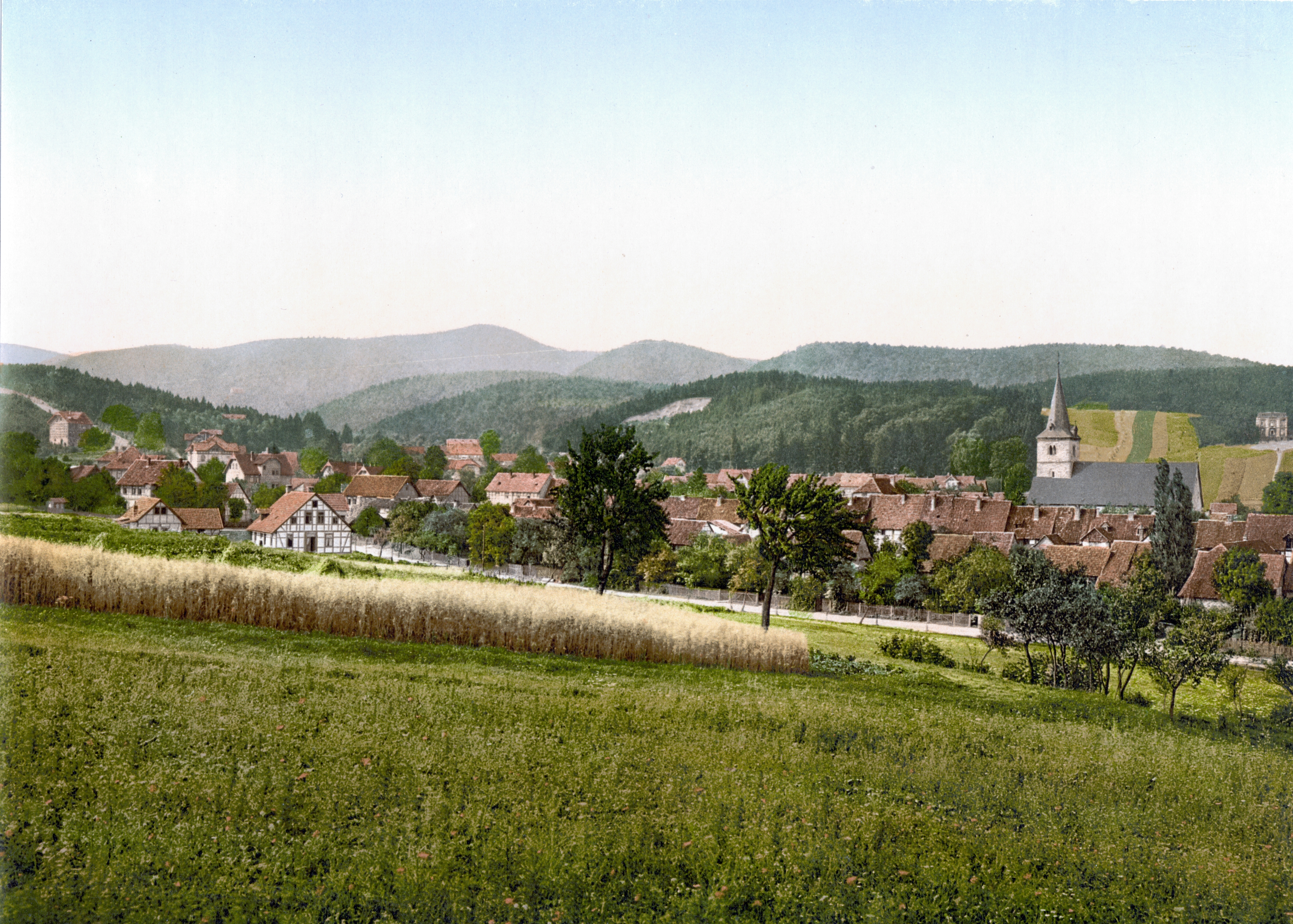 Bad Sachsa